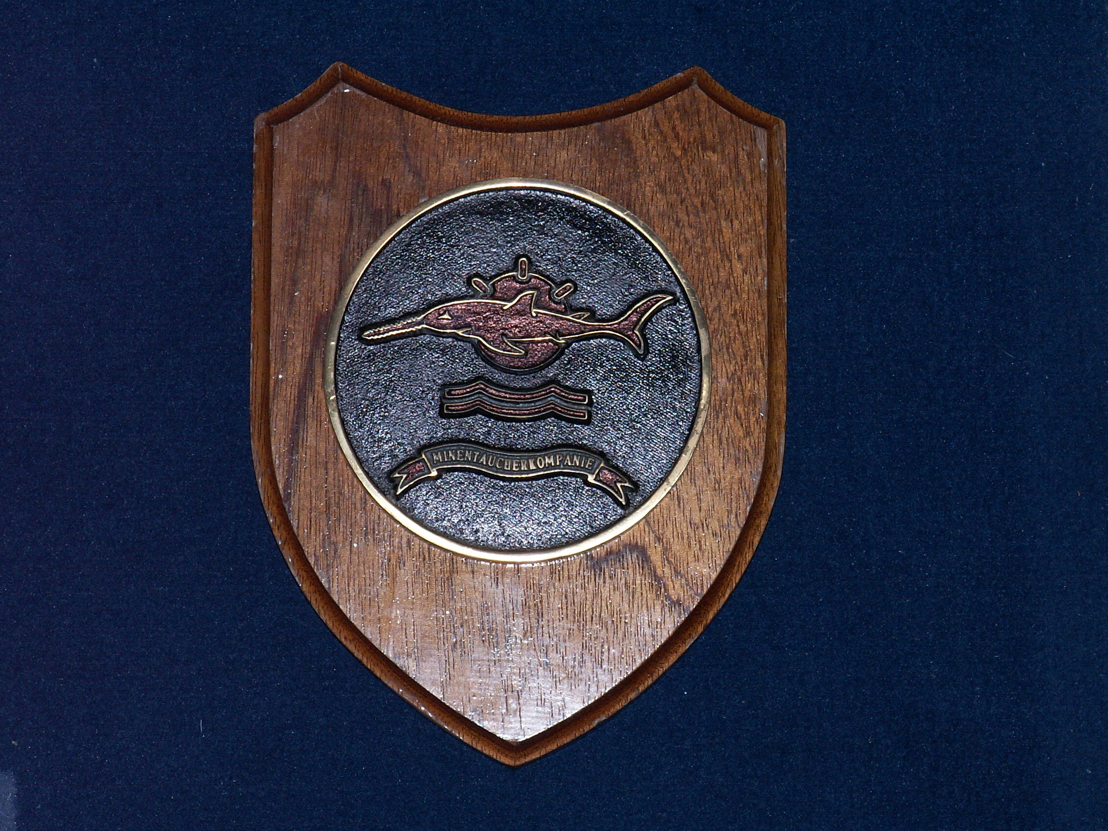 Wappen der Minentaucherkompanie, fotografiert am 02.06.06 von Personaldisponent (Fotograf und Besitzer des Wappens)